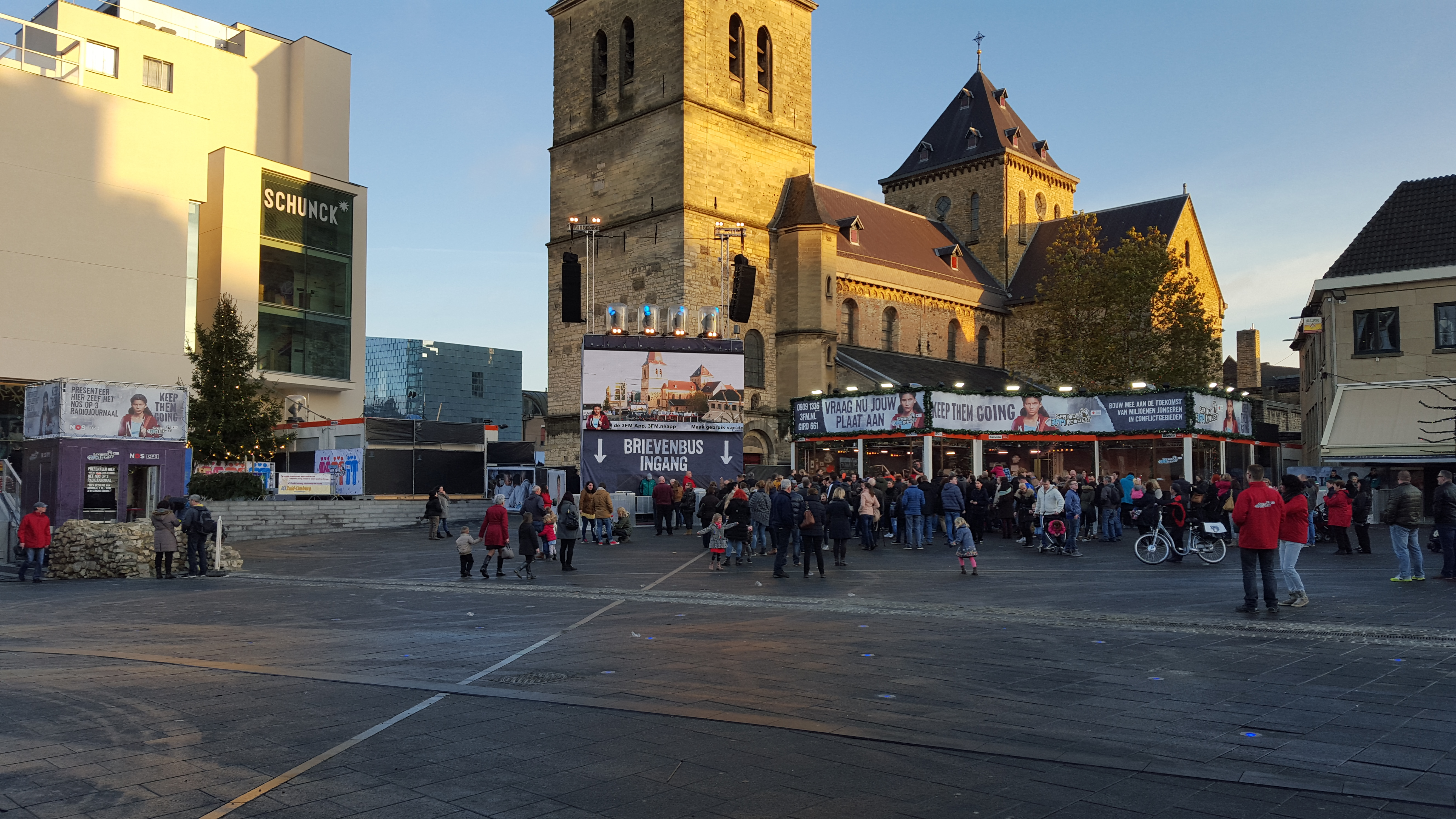 Het Glazen Huis in Heerlen, Serious Request 2015